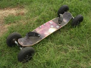 Fotografia di una tavola da mountainboard. Foto personale. Giuaig Luglio 2006. No copyrights.